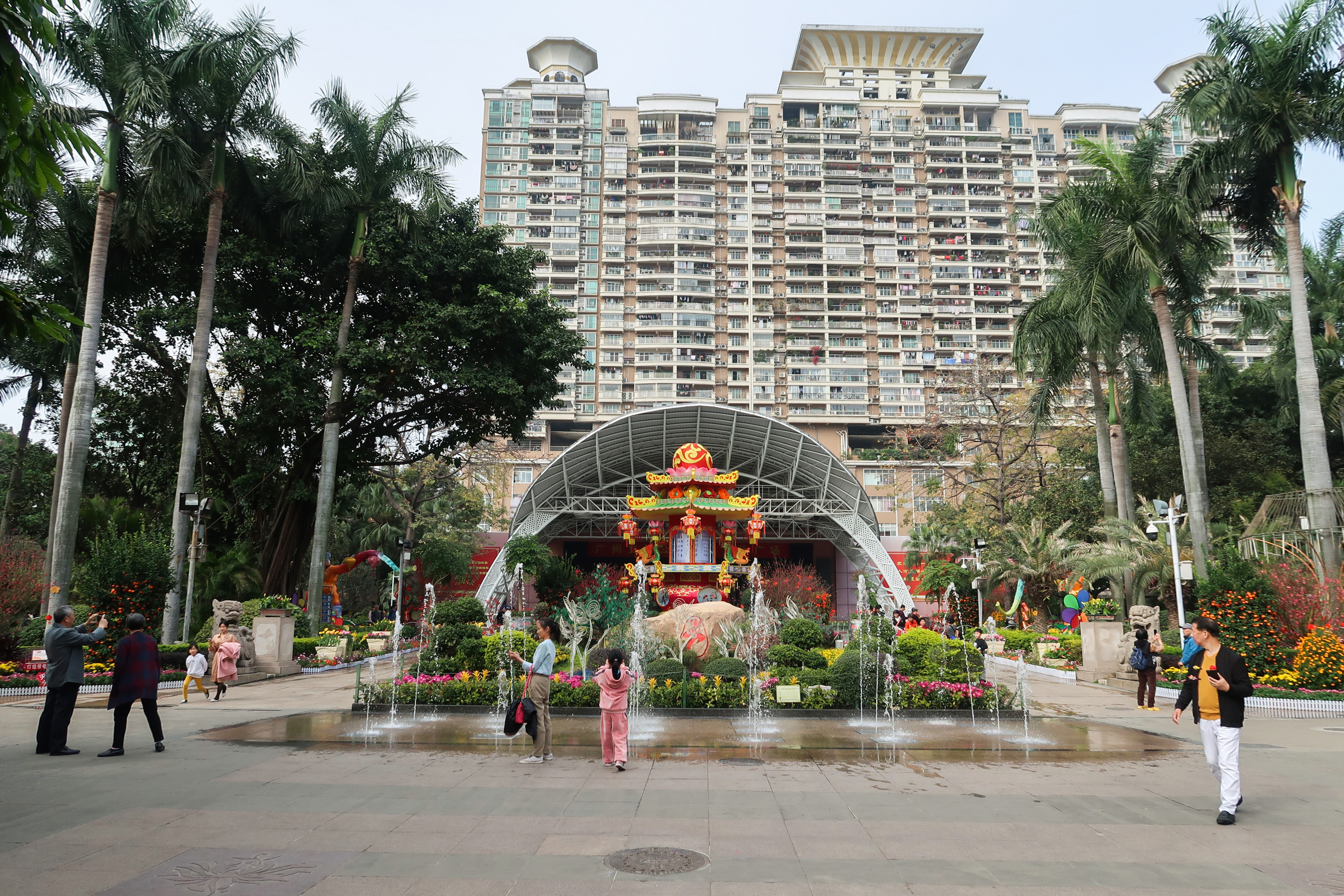 Guangzhou Cultural Park